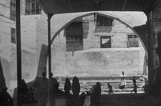 إحدى حارات مكة المكرمة القديمة